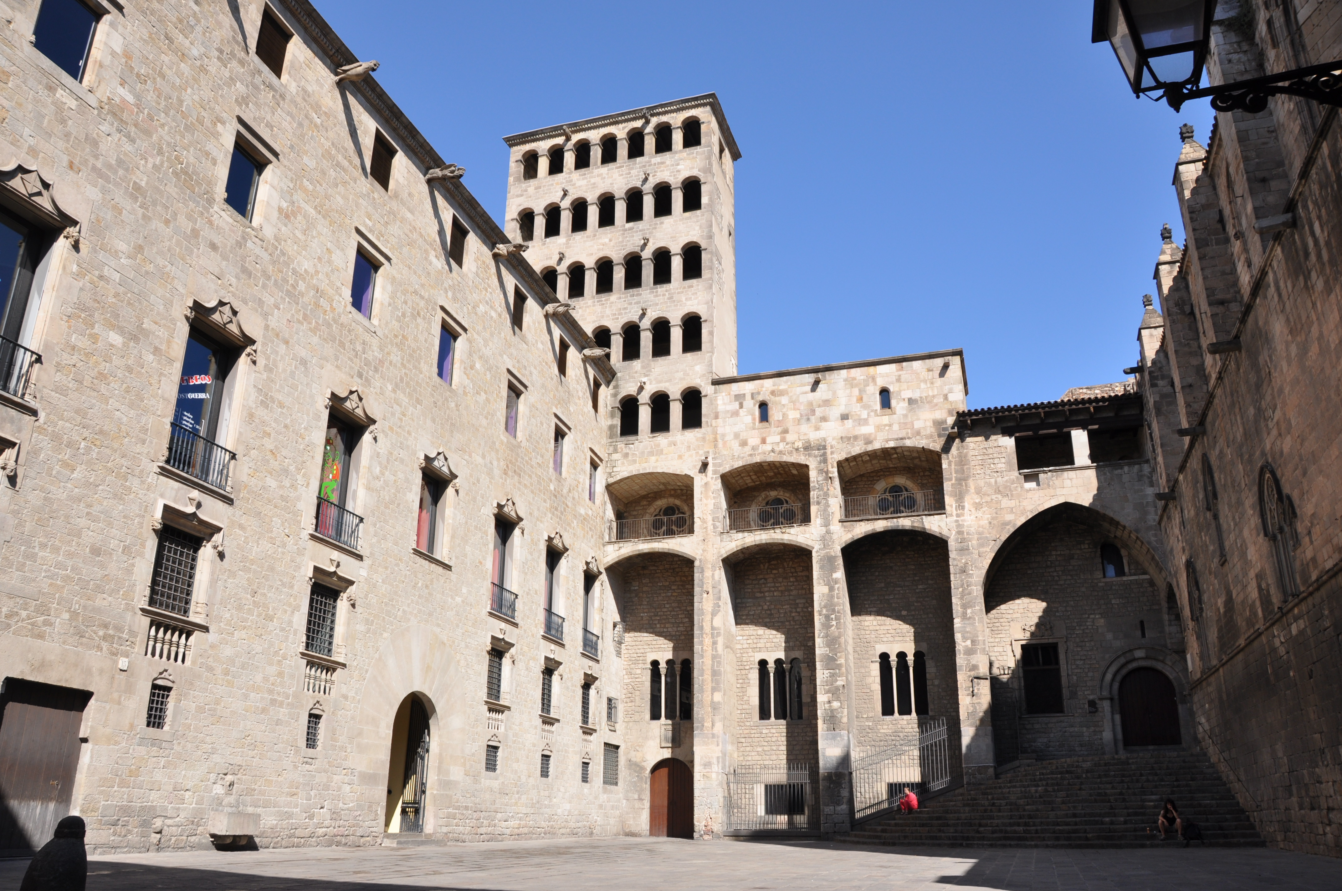 Barcelona. Plaça del Rei. A l'esquerra el Palau del Lloctinent. A la dreta. la capella de Santa Àgata. Davant, el Saló del Tinell i el mirador del rei Martí.